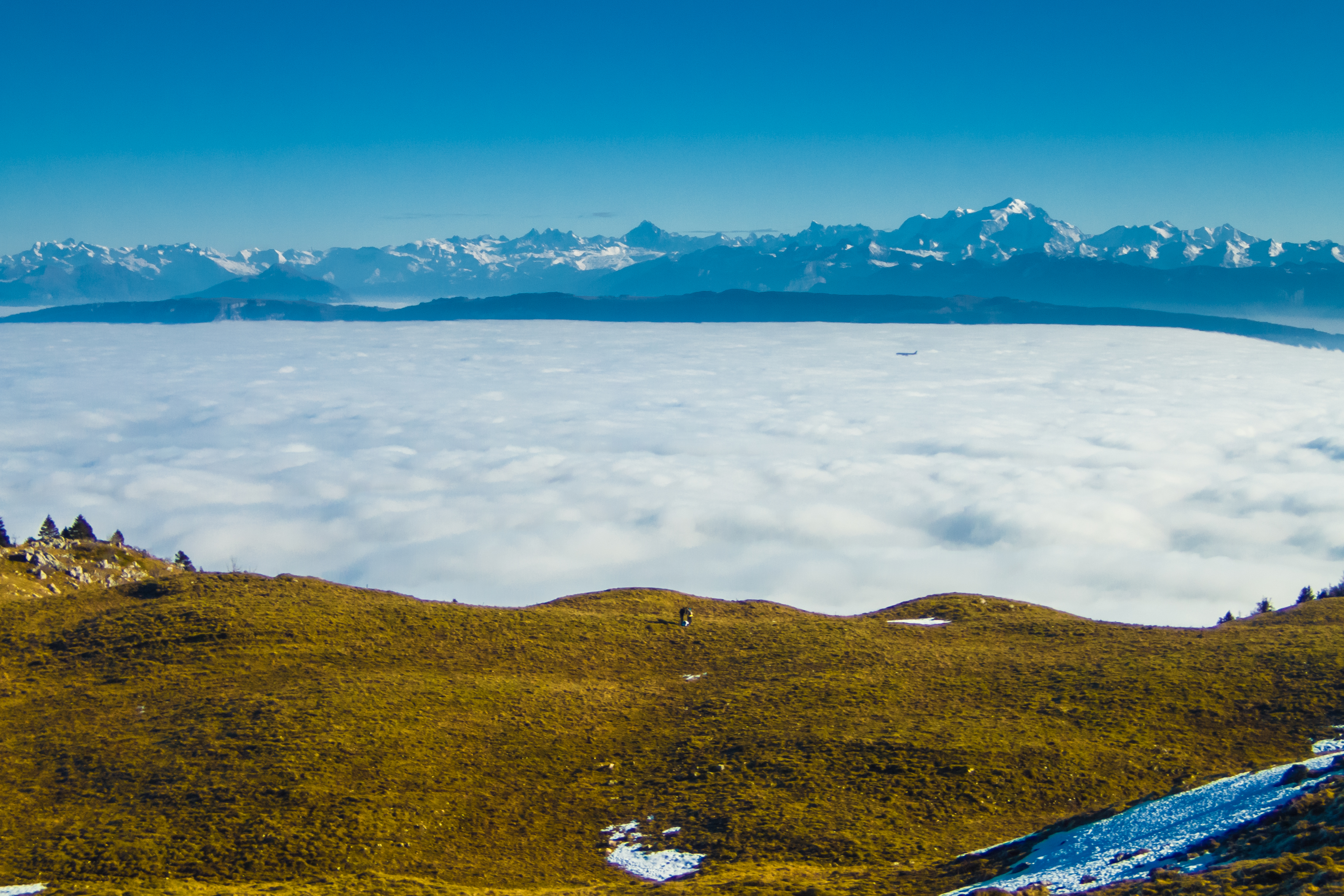 Vue sur le bassin genevois et le massif du Mont-Blanc depuis le Haut-Jura